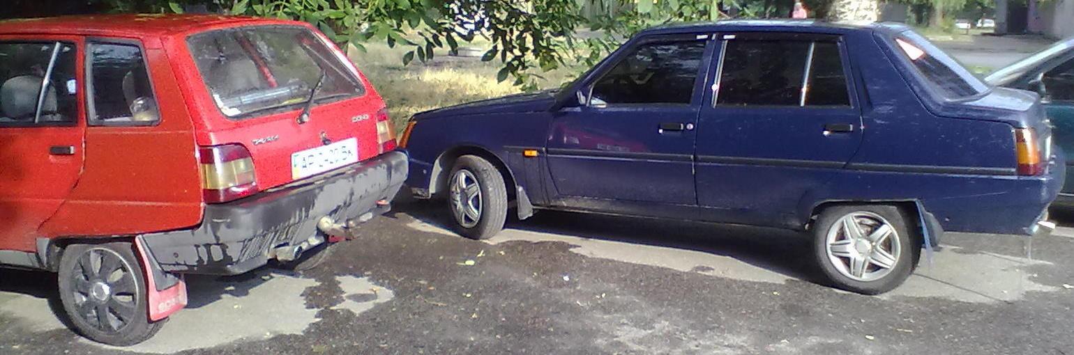 Самая различающаяся - задняя часть боковины и багажник ЗАЗ-1105 «Дана» (красная) и ЗАЗ-1103 «Славута» (синяя)